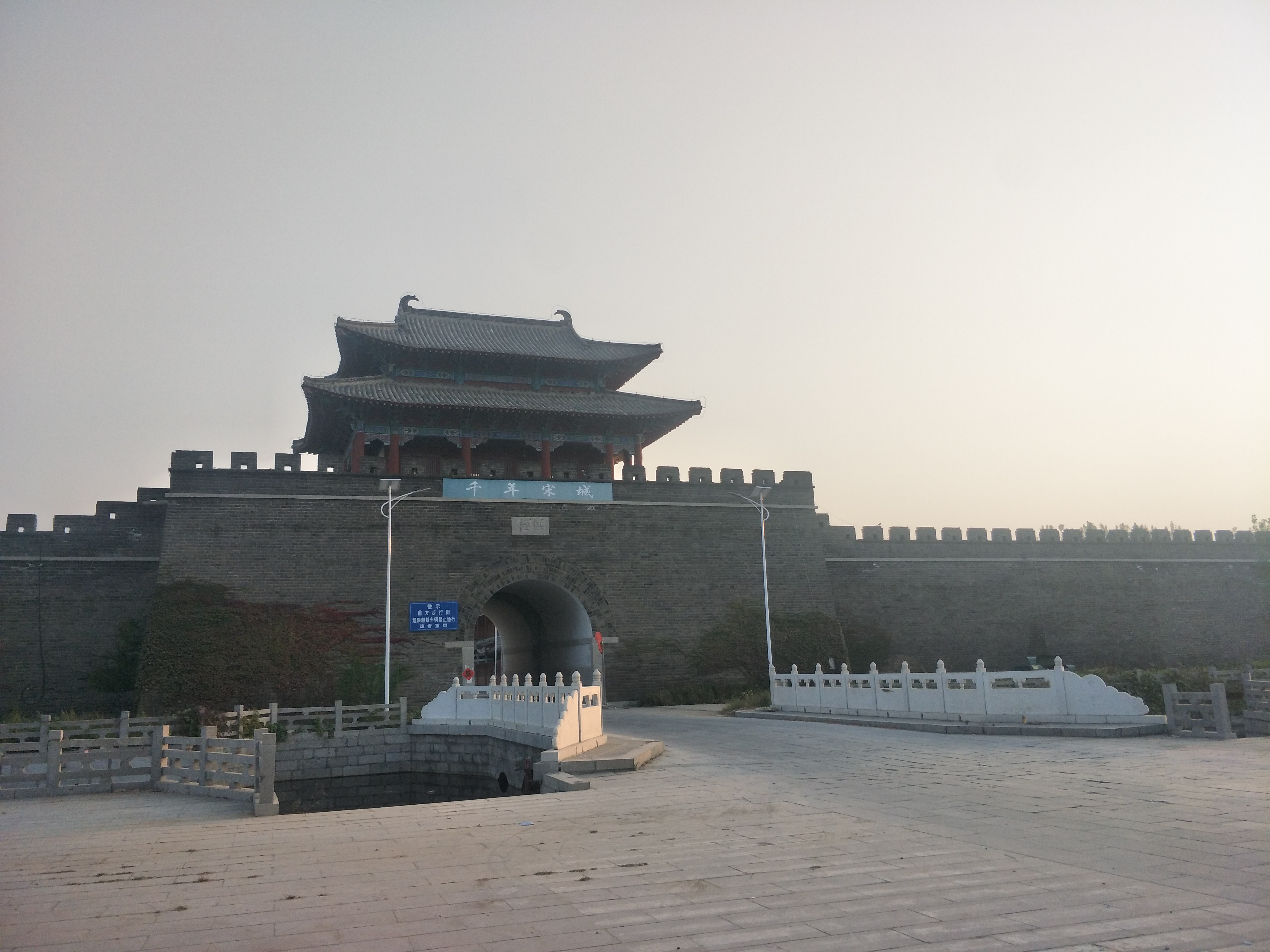 中文（中国大陆）: 东平州城城门